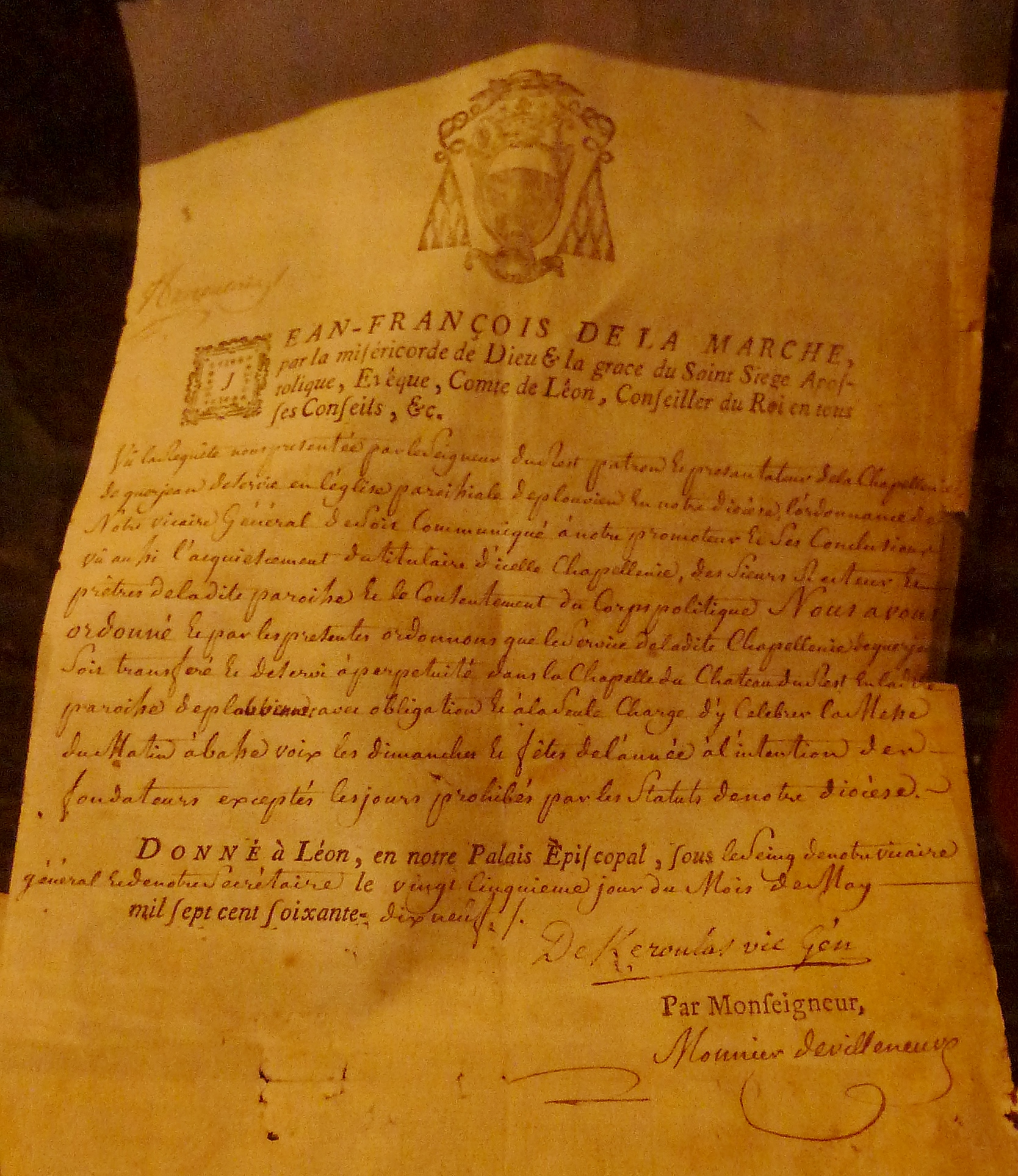 Lettre de Mgr Jean-François de la Marche conservée au château de Kérouzéré concernant le transfert d'une chapellenie de Plouvien en faveur de la chapelle du château du Rest en Plabennec